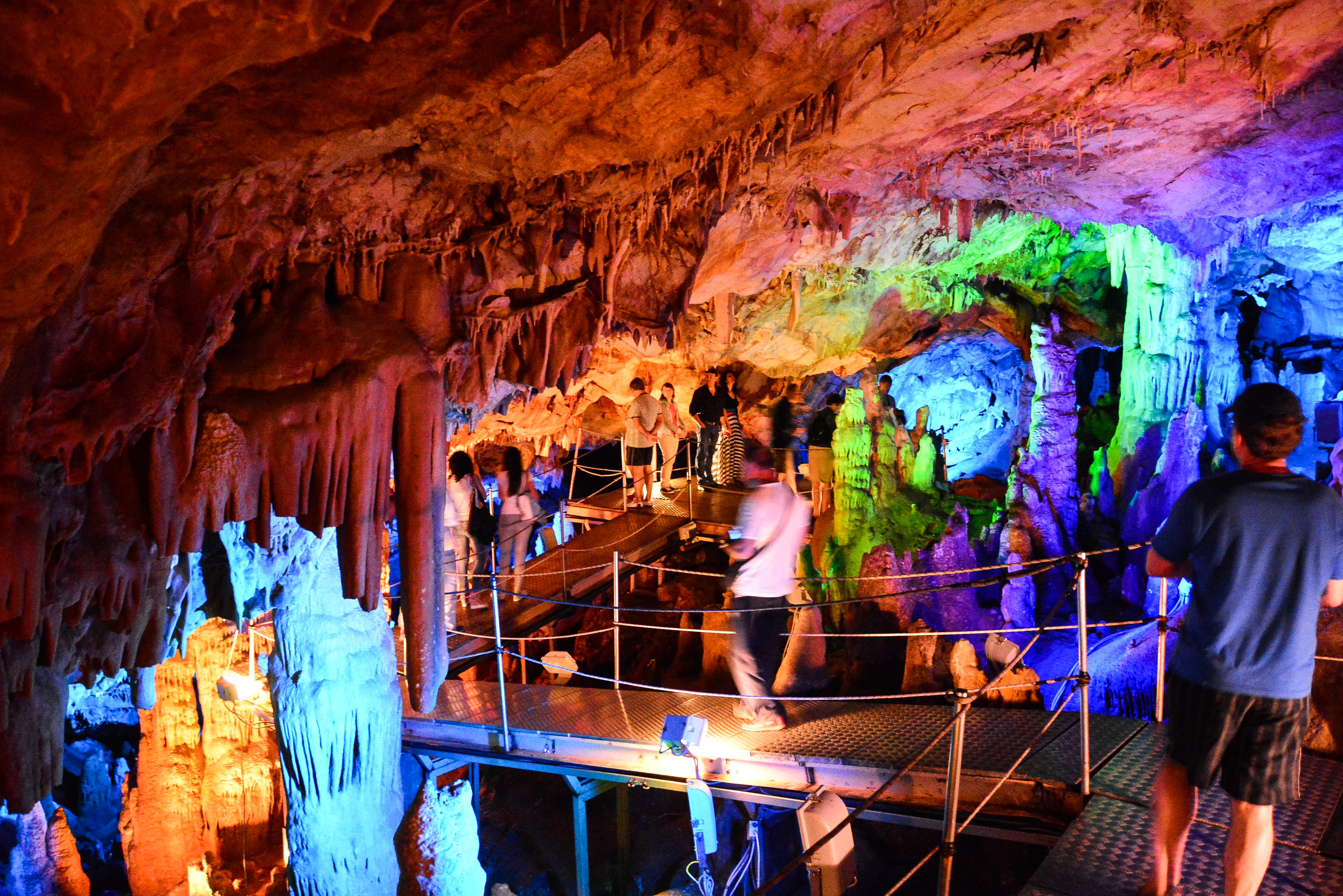 Σπήλαιο Σφενδόνη«Σπήλαιο Σφενδόνη»